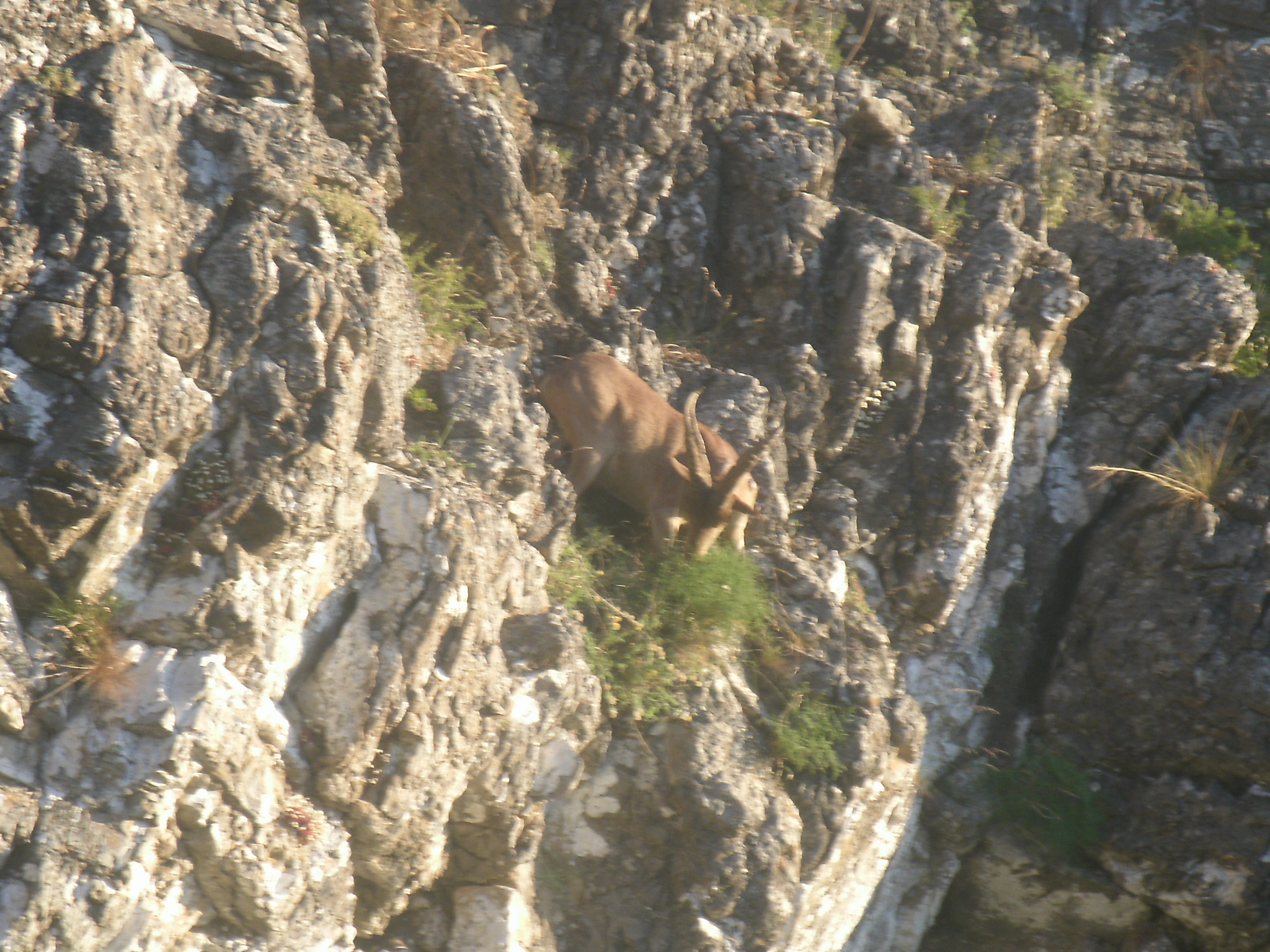 Cabra Montes al atardecer.